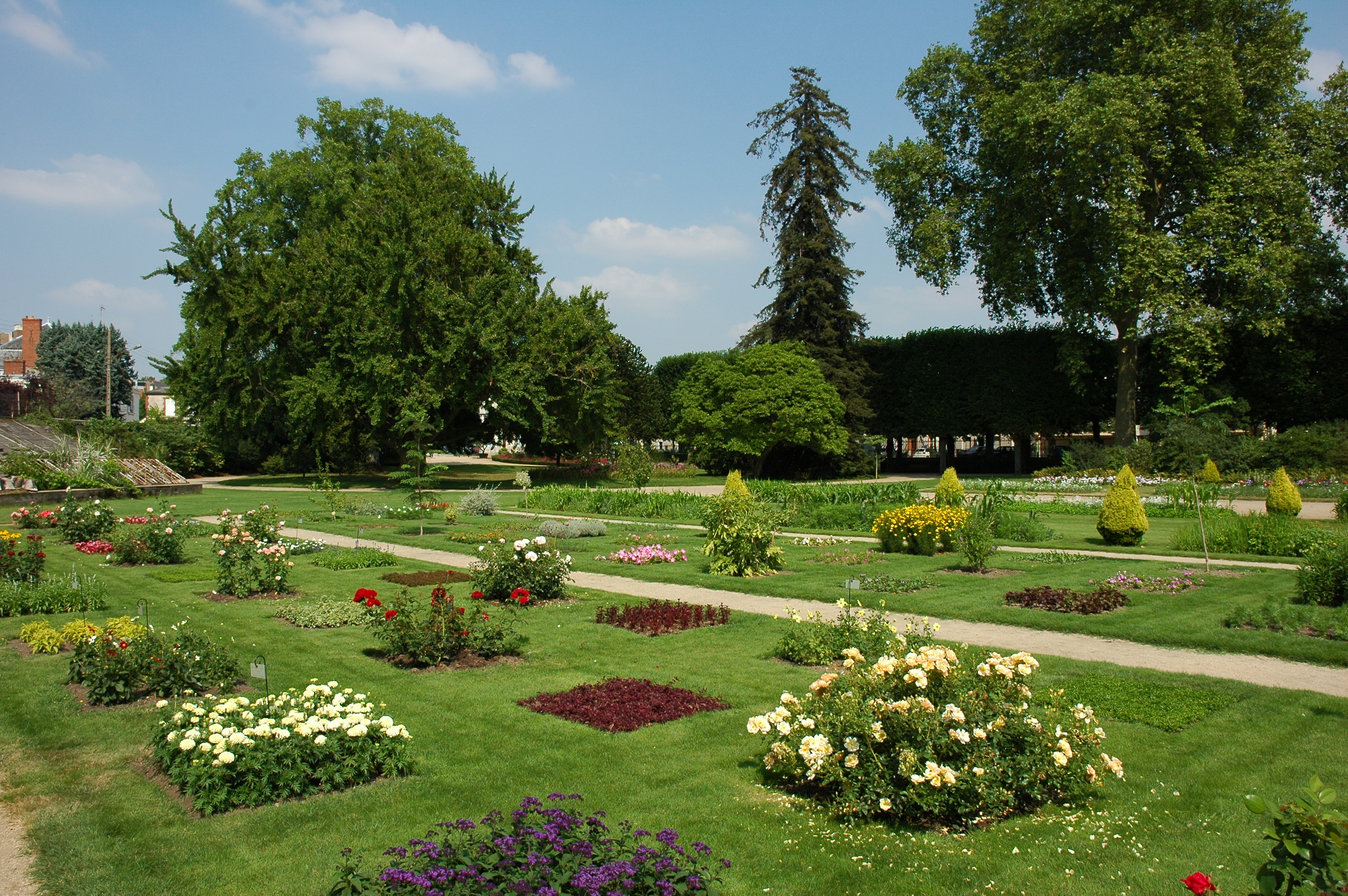 France Loiret Orléans Le jardin de plantes Photographie prise par GIRAUD Patrick